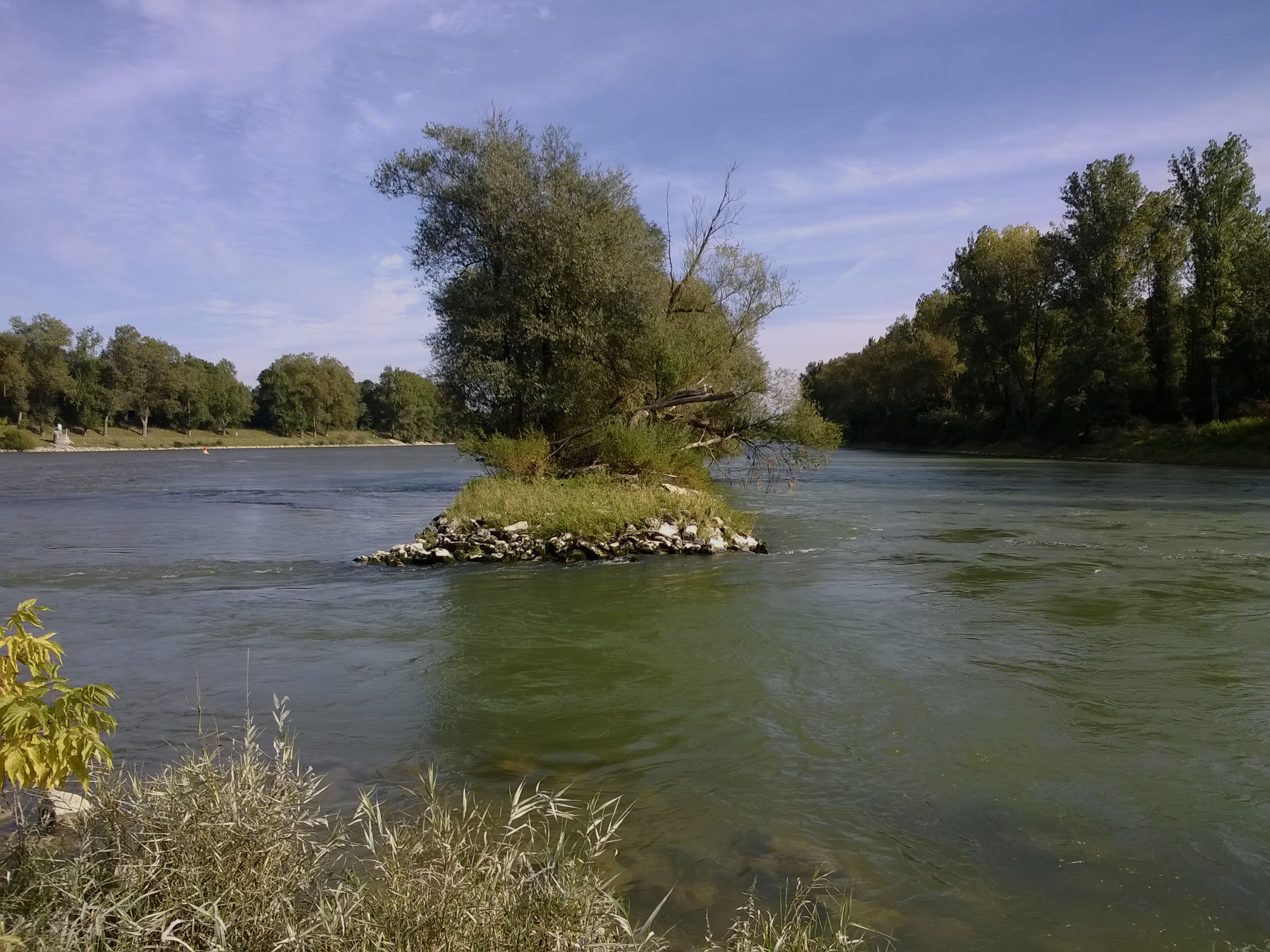 Zusammenfluss von Donau und Isar (links Donau, rechts Isar)